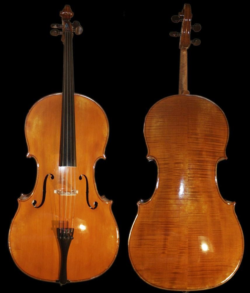 Léon Bernardel (1023) (Body 76.2cm)